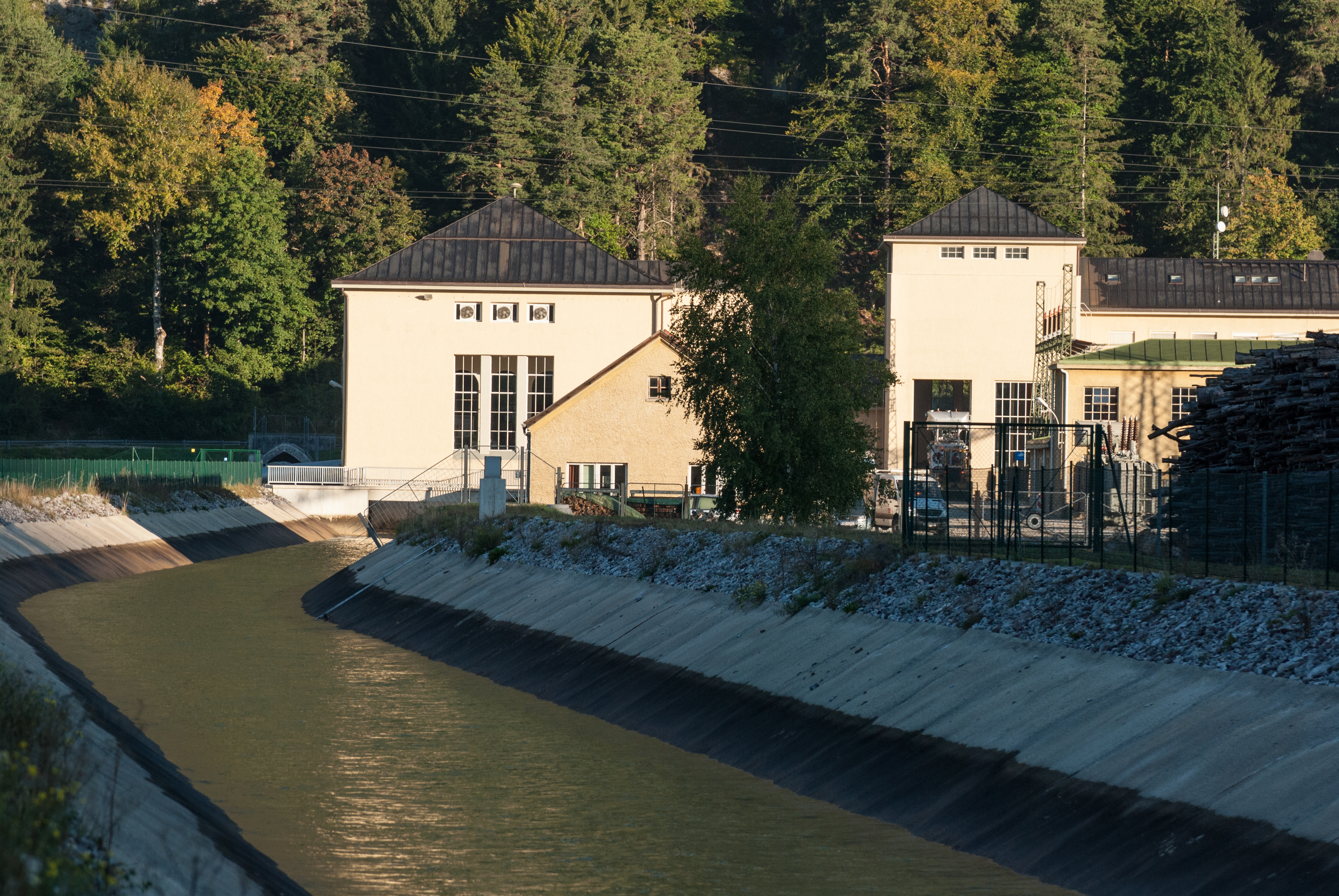 Achensee-Kraftwerk in Jenbach kurz nach Sonnenaufgang